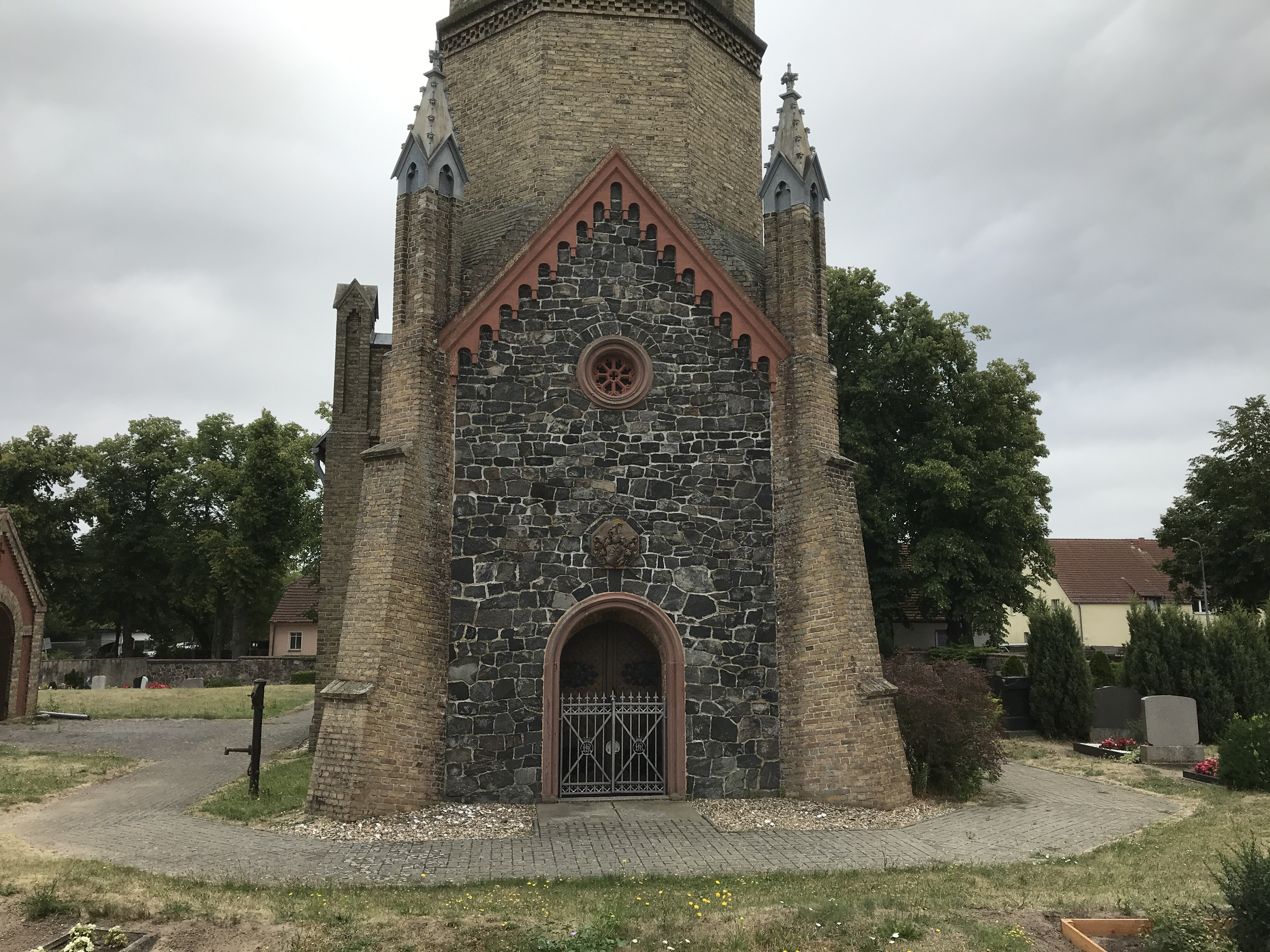 Die neugotische Dorfkirche in Plessow der Stadt Werder (Havel) entstand im 19. Jahrhundert aus Feldsteinen und Mauersteinen.